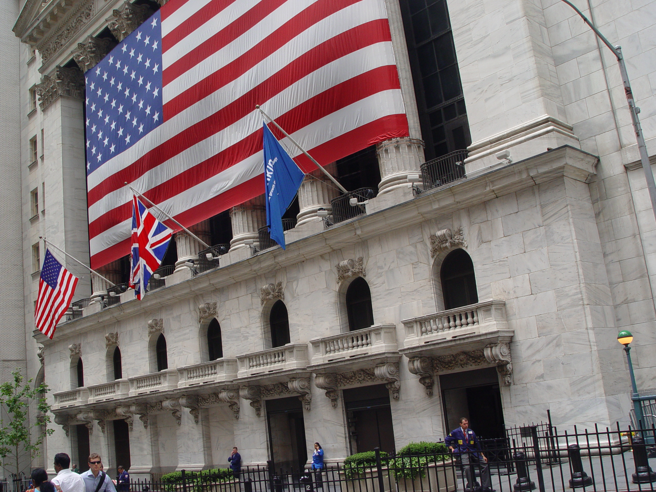 美國紐約 201New York, USA